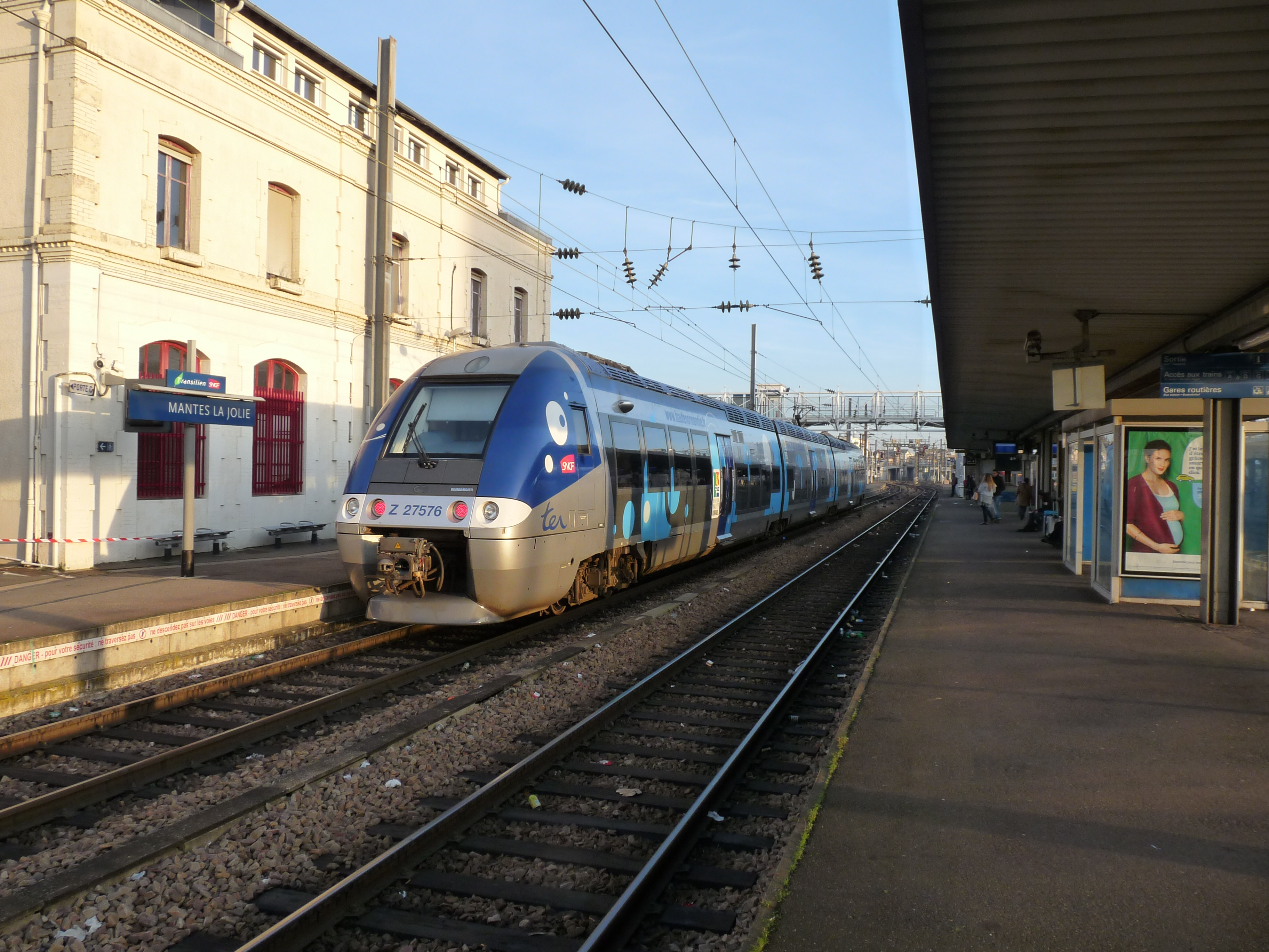 Treinen in Mantes-la-Jolie station. Hier een TER trein van Haut-Normandie